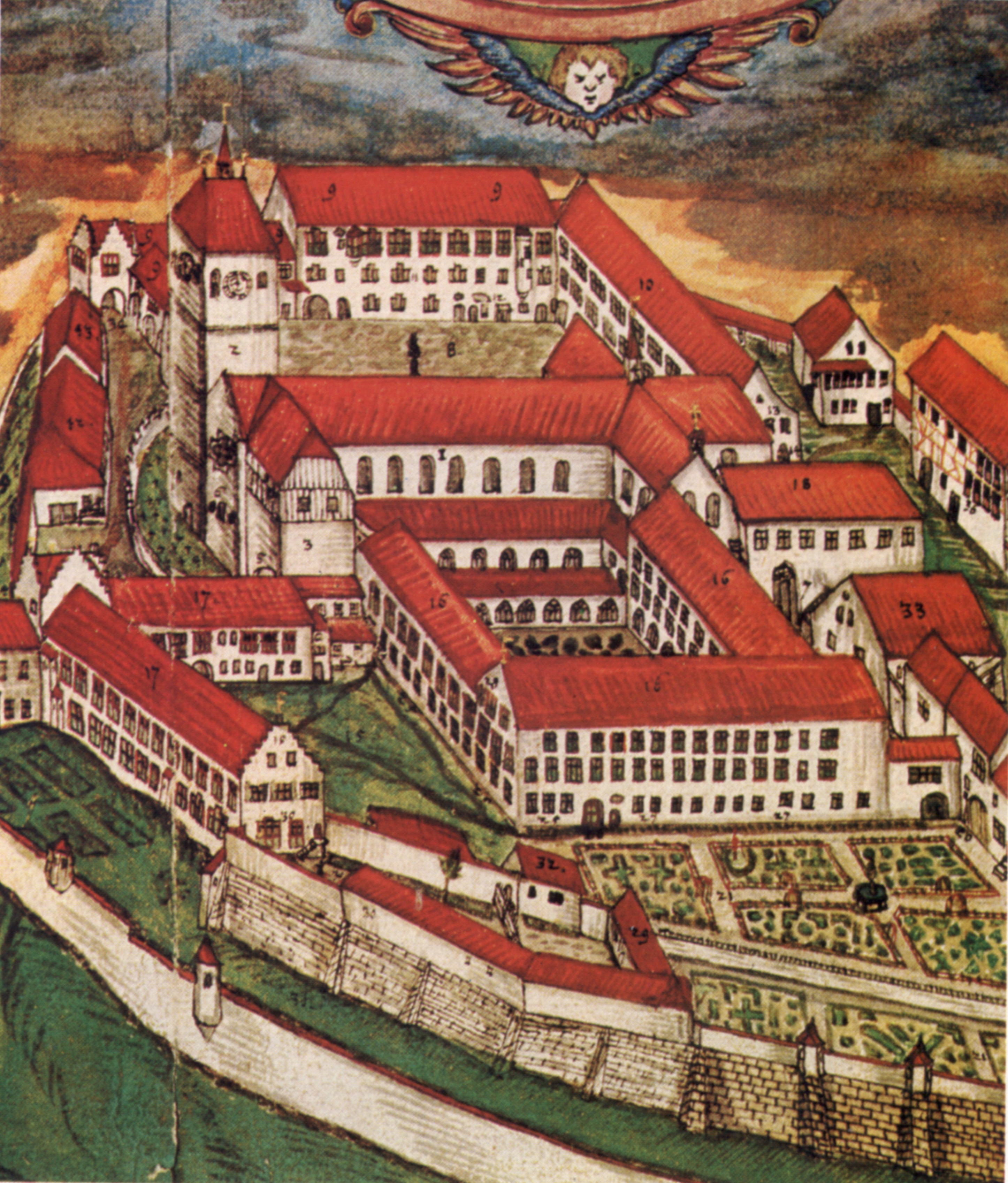 Kloster Weingarten von Südwest, 1627 (Ausschnitt), aus: Württembergische Landesbibliothek HB V 4 fol 234v–235r